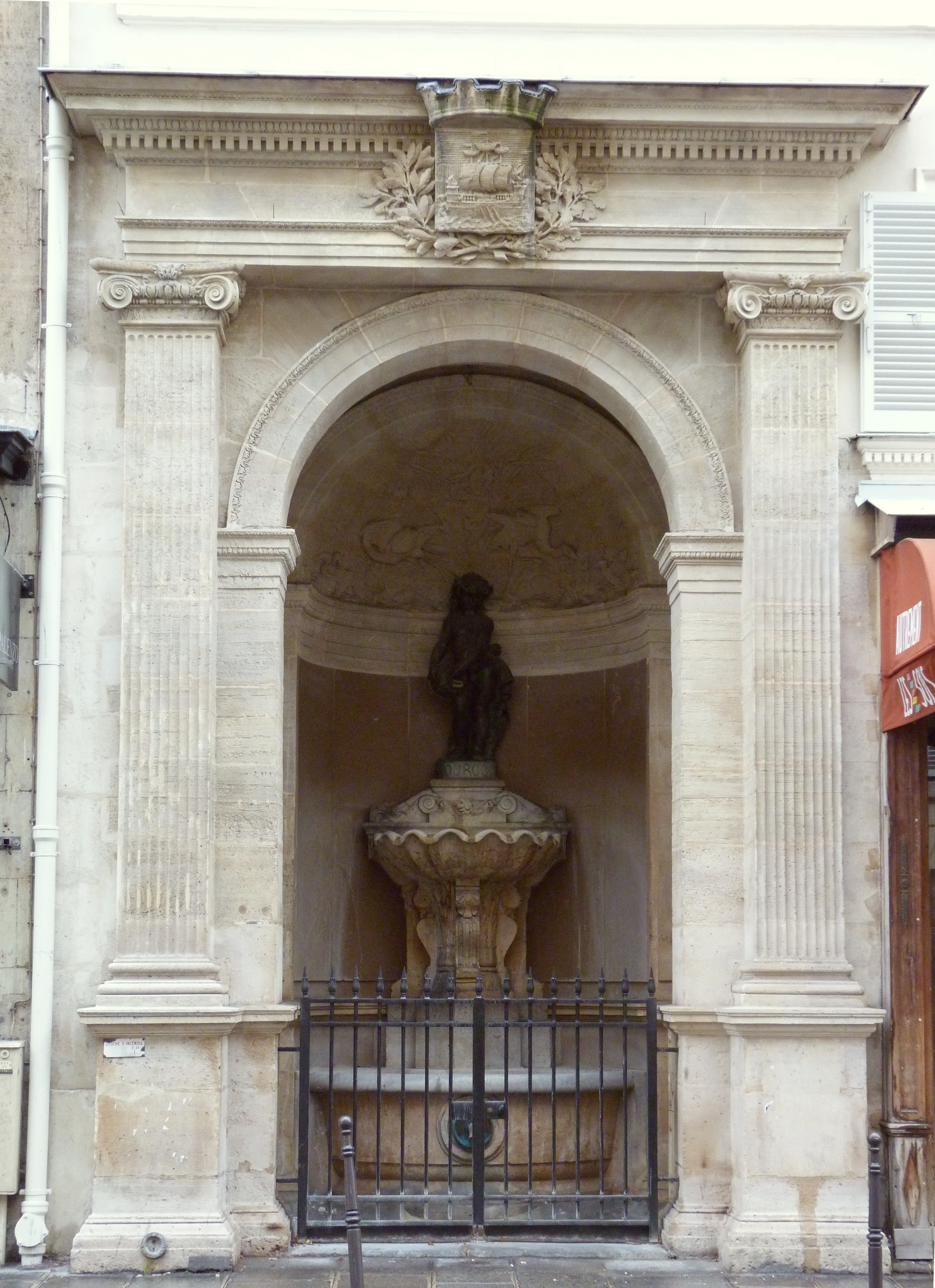 Fontaine de Joyeuse (1847), au 41, rue de Turenne, Paris (3e arrondissement).